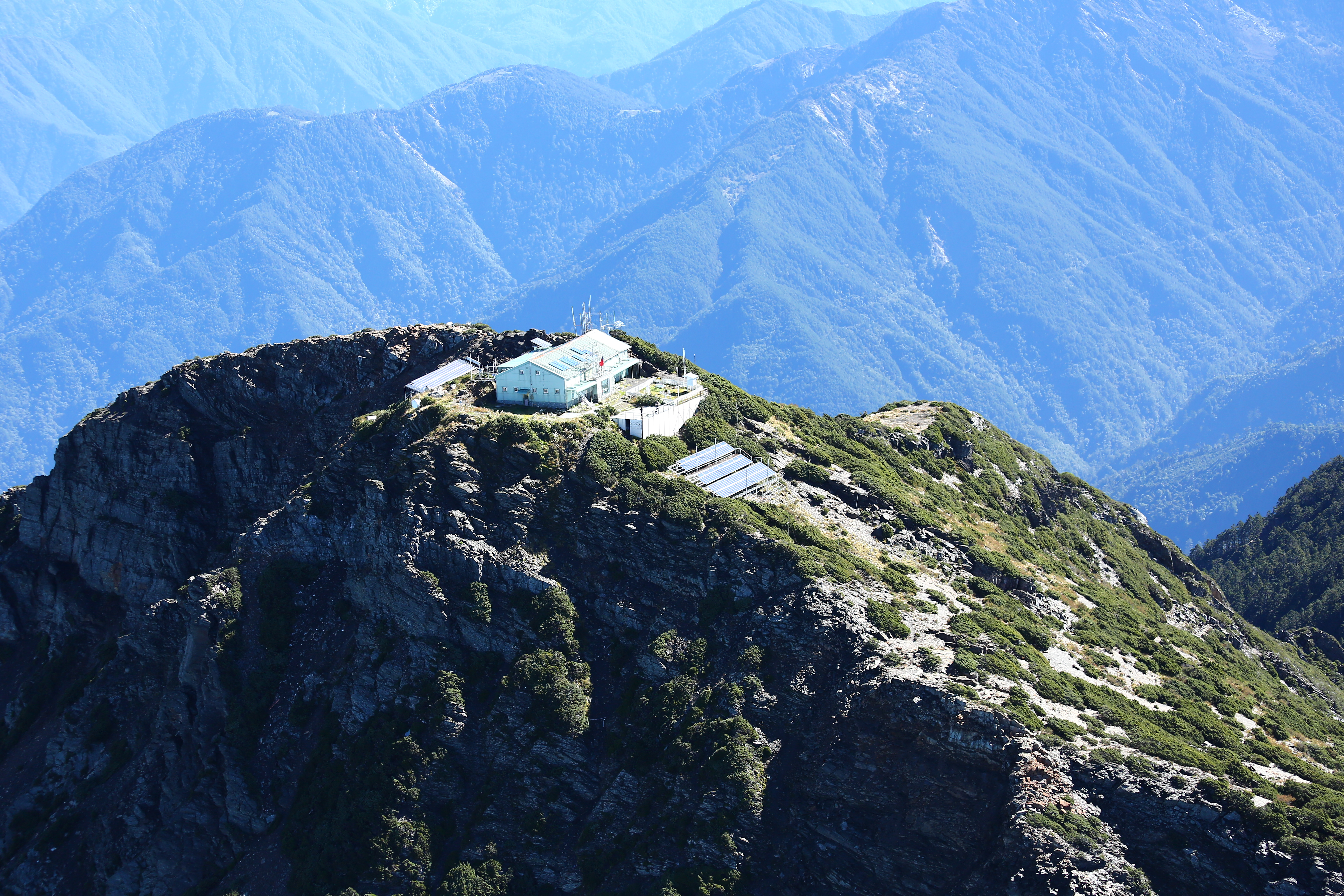 冬季的玉山北峰玉山氣象站